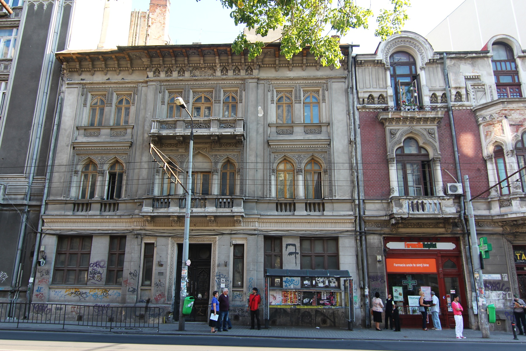 Casă pe Bulevardul Carol